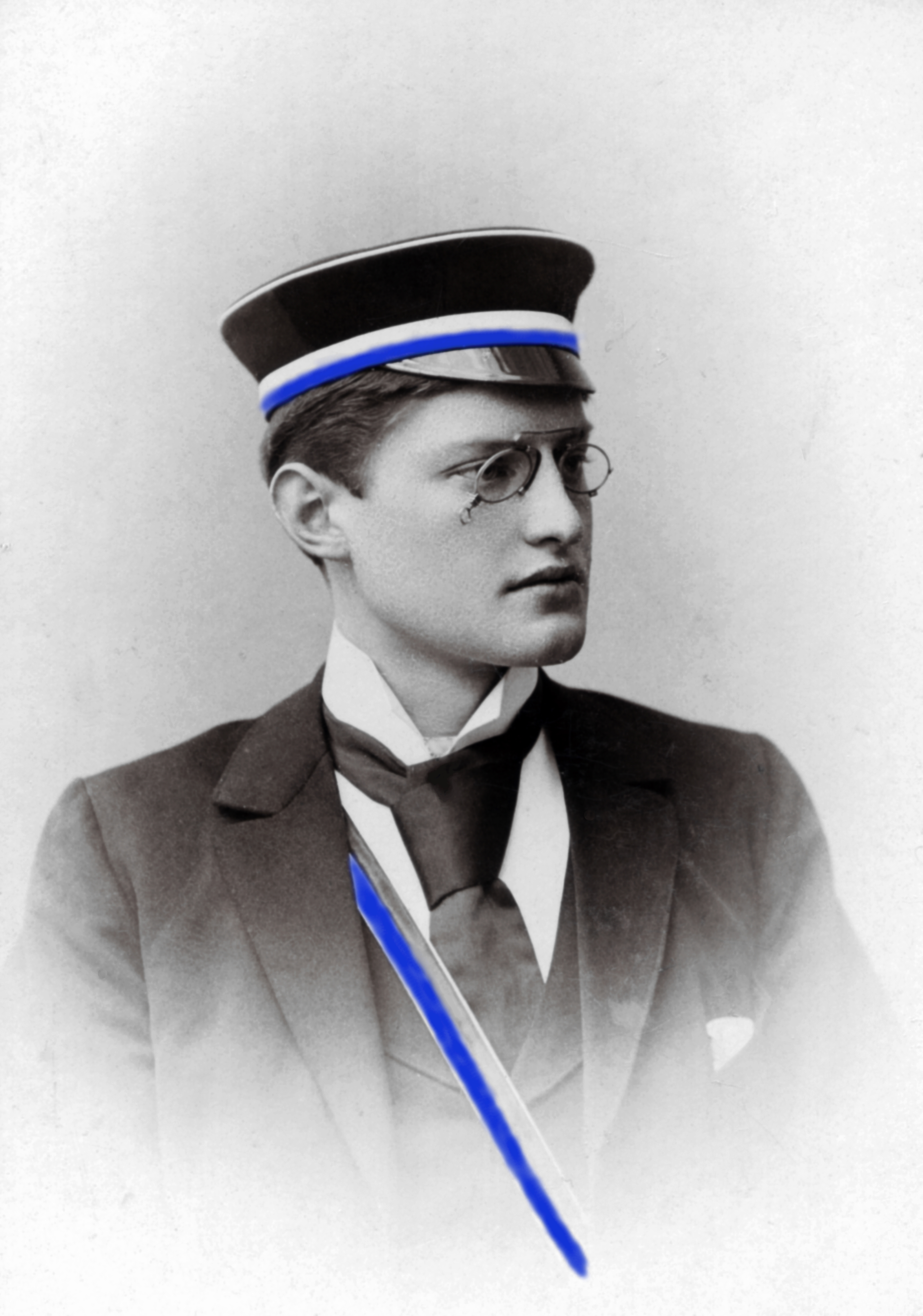 Fotografie von Hermann Rotberg als Corpsbursche der Suevia München